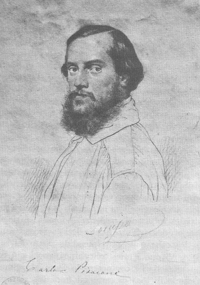 M. Lorusso